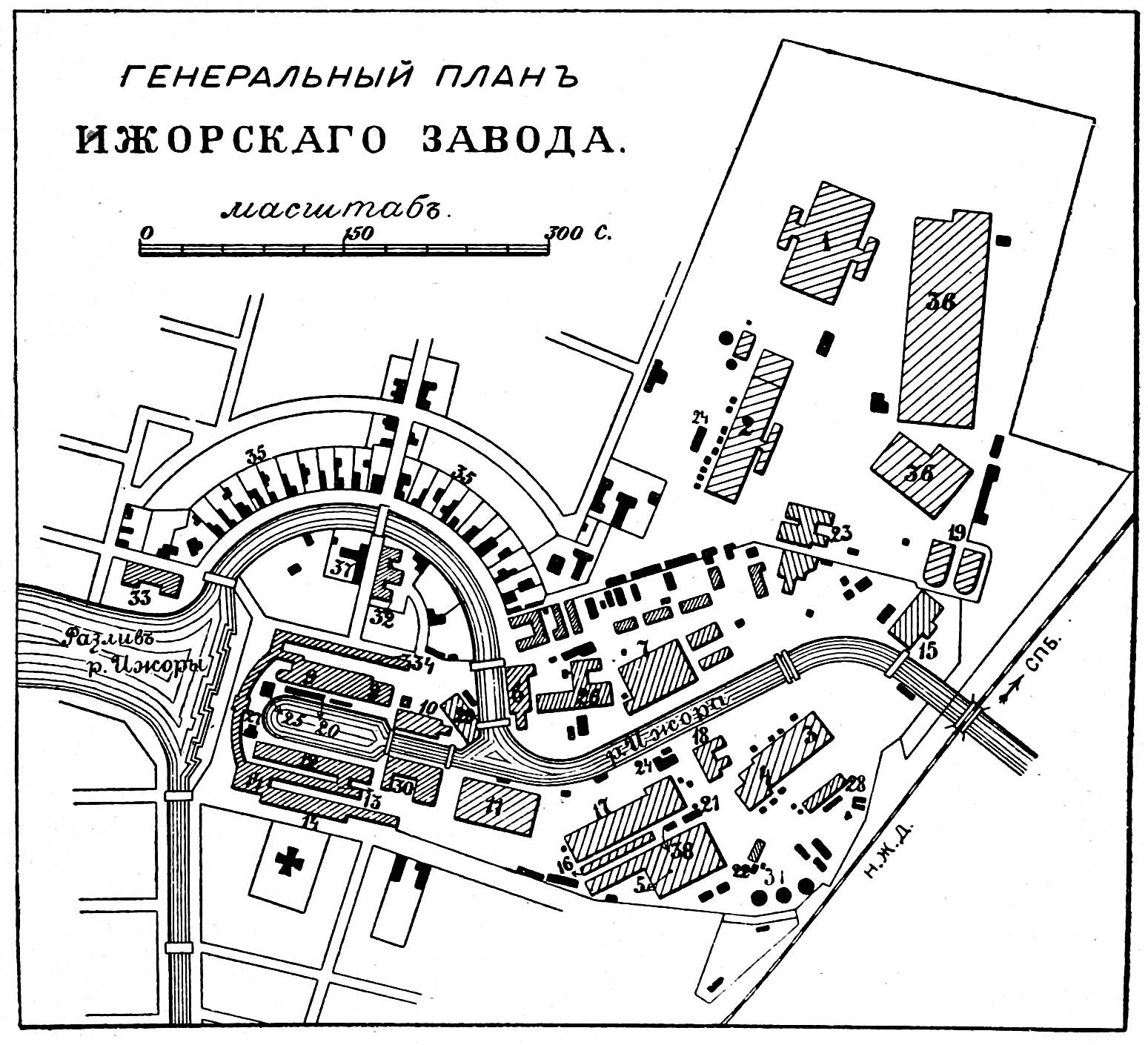 Генеральный план Ижорского завода. 1 — Бронеотдел. мастерские. 2 — Бронезакалочные мастерские. 3 — Старый броневой завод. 4 — Закалочная. 5 — Механические мастерские. 6 — Латуннопрокатные мастерские 7 — Цельнотянутые трубные мастерские. 8 — Модельная. 9 — Якорная, медно-прокатная. 10 — Корабельная. 11 — Трубопрокатные и железокот. мастерские. 12 — Паровая кузница и новая сборочная. 13 — Кузница мелких поковок. 14 — Старая сборочная, минная, чугуннолит., слесарная. 15 — Больш. сталепл. маст. 16 — Кузница и котловая. 17 — Железоделательный завод. 18 — Сталепл. маст. 19 — Гофманские печи. 20 — Цепопробная. 21 — Компрессоры. 22 — Глиномятная. 23 — Завод огнеупорного кирпича. 24 — Генераторная. 25 — Кирпичный завод. 26 — Гильзовый завод. 27 — Газовый завод. 28 — Котловая. 29 — Эллинги. 30 — Электрическая станция. 31 — Нефтяные баки. 32 — Больница. 33 — Заводская школа. 34 — Административный флигель. 35 — Дома служащих. 36 — Склады. 37 — Собрание. 38 — Ремонтная. Это изображение было использовано для иллюстрирования статьи «Ижорский завод» опубликованной в десятом томе «Военной энциклопедии», который был издан книгоиздательским товариществом И. Д. Сытина в 1912—1913 гг. в столице Российской империи городе Санкт-Петербурге.